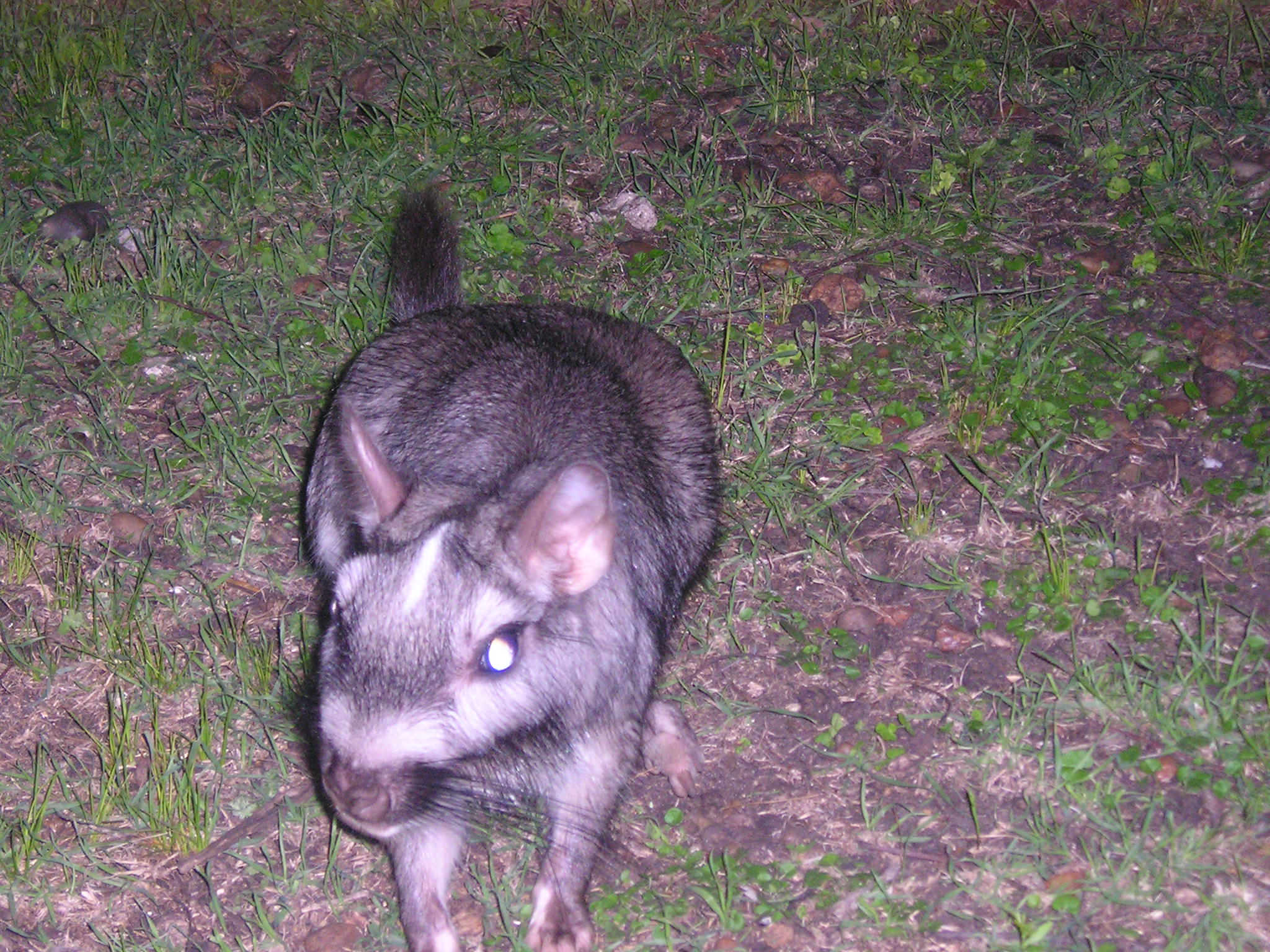 Lagostomus maximus. Parc National El Palmar en Argentine (Entre-Rios)